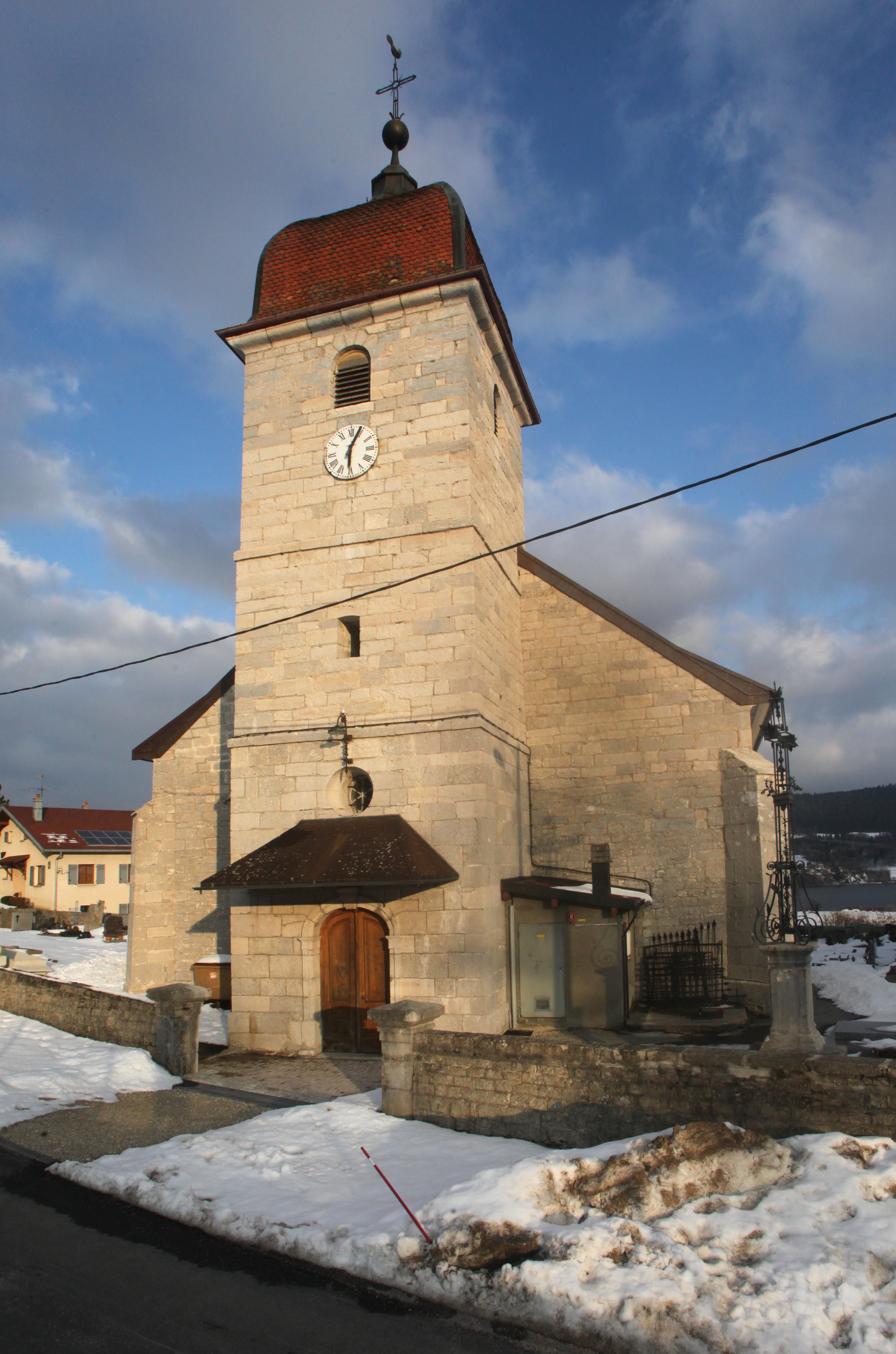 Eglise des Grangettes (Doubs).